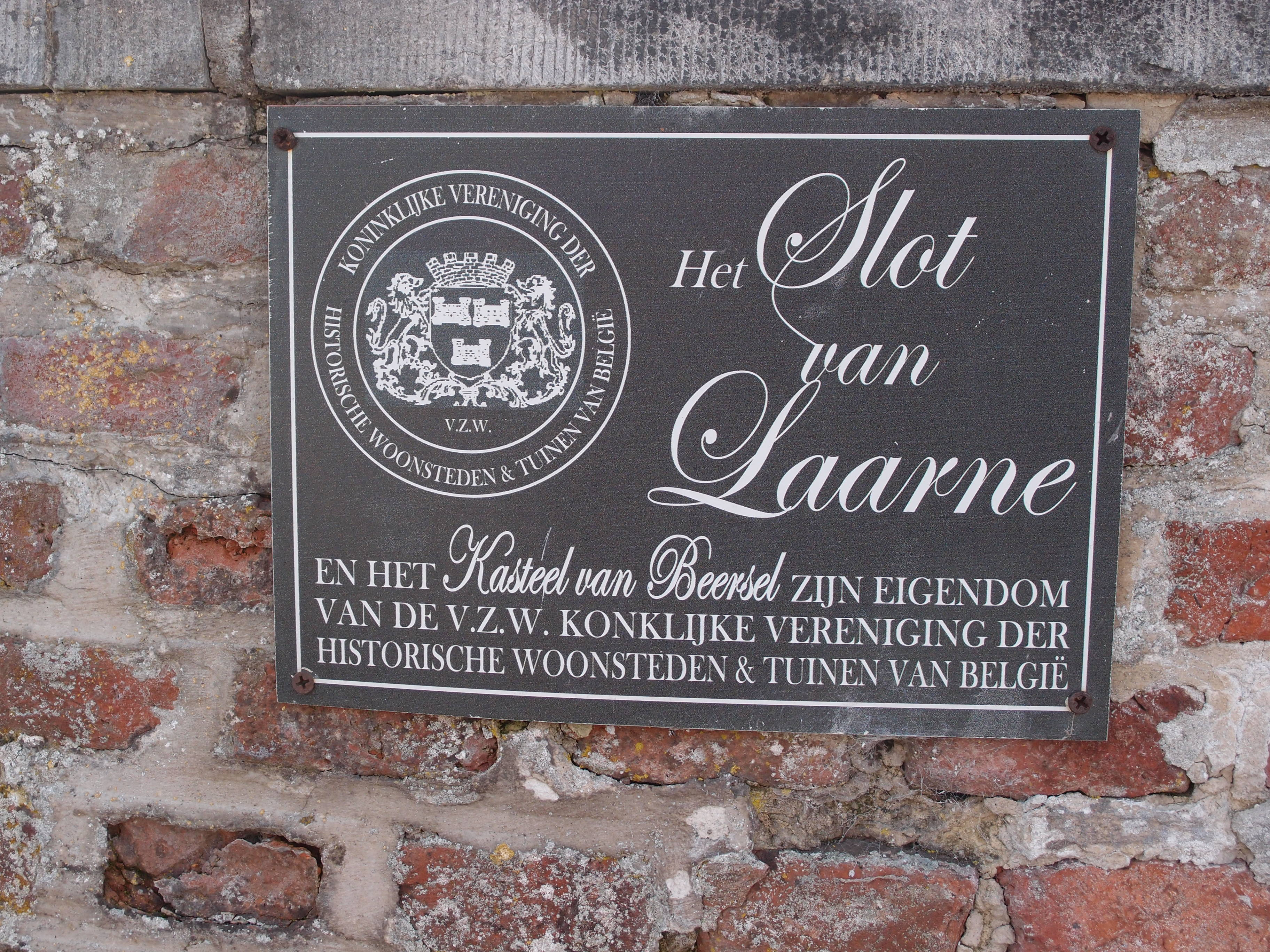 Schloss Laarne (Belgien) - Hinweisschild Datum: 08.03.2014 Urheber: M. Pfeiffer alias Gordito1869 Quelle: privates Fotoarchiv des Urhebers